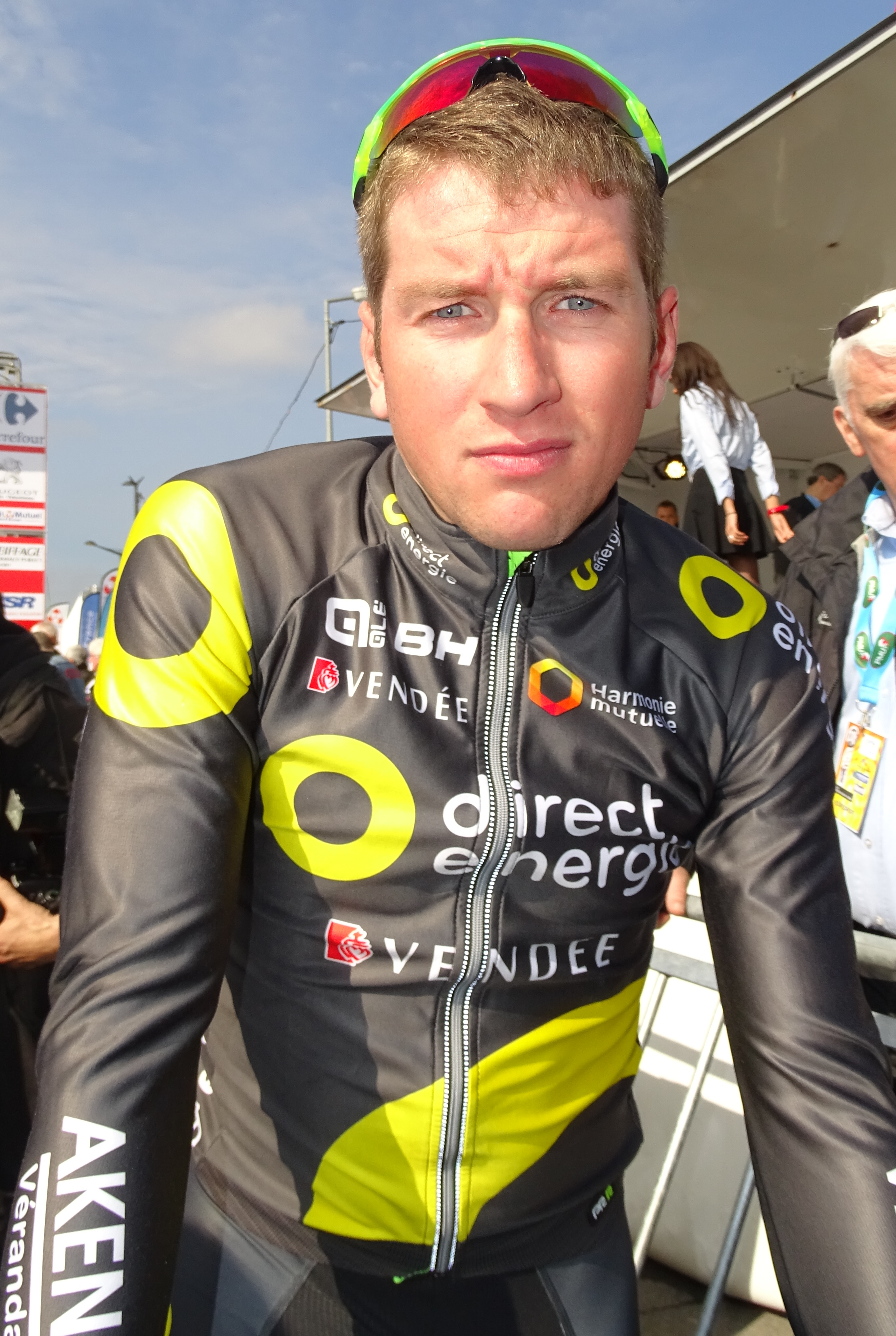 Reportage réalisé le jeudi 14 avril à l'occasion du départ et de l'arrivée du Grand Prix de Denain 2016 à Denain, Nord, Nord-Pas-de-Calais-Picardie, France.